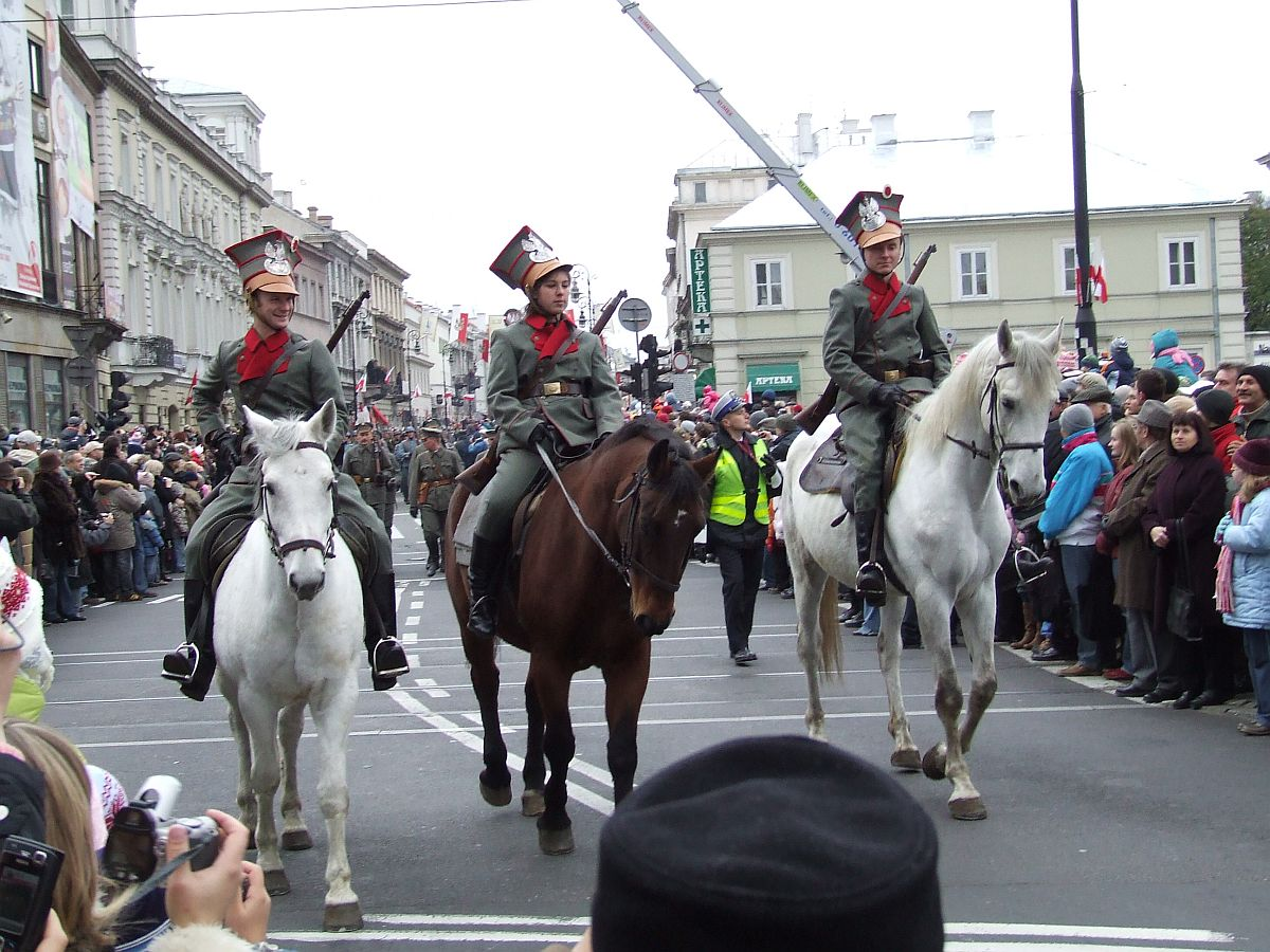 pl:1 Pułk Ułanów Legionów Polskich (reconstruction)